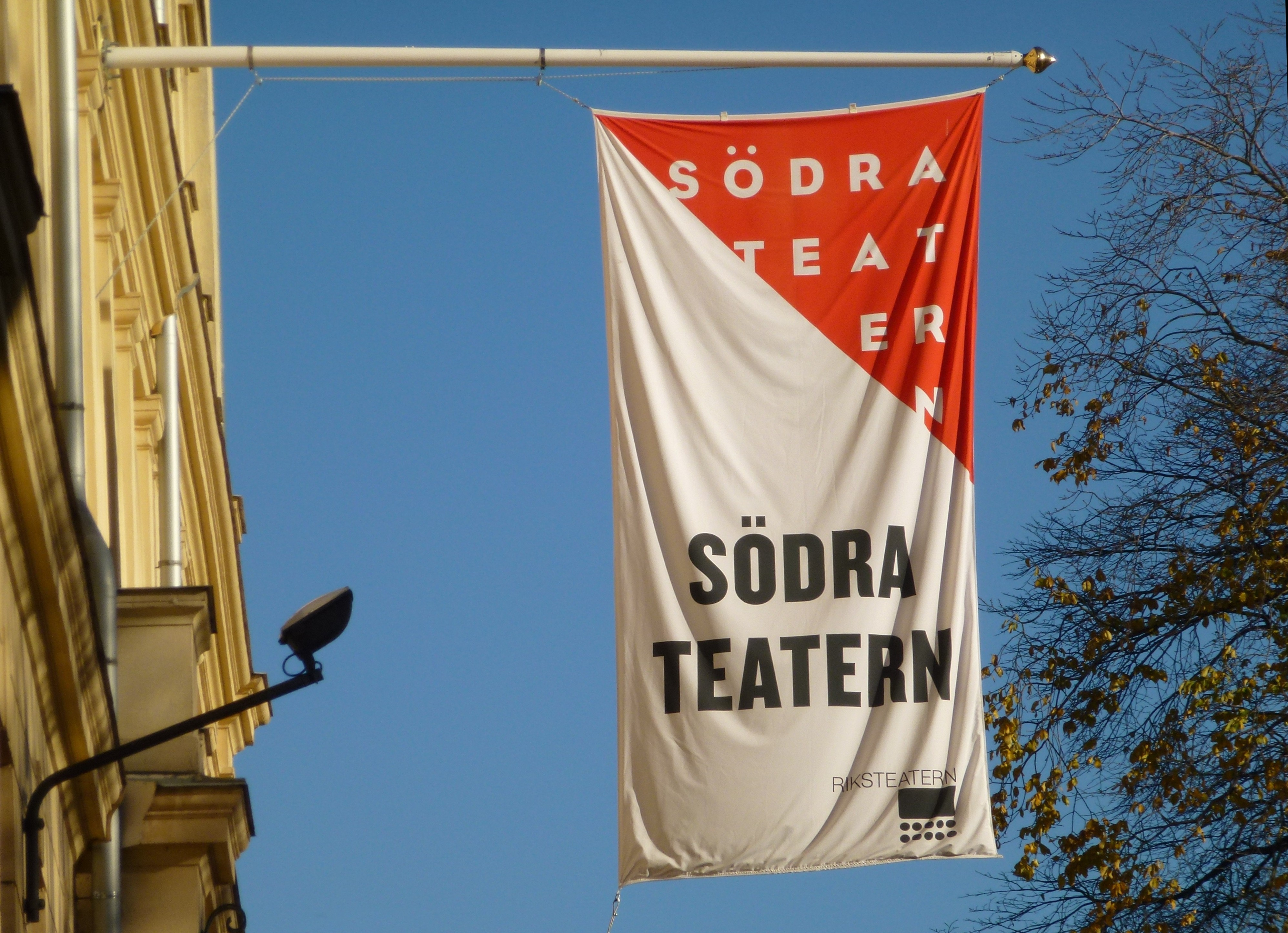 Södra teaterns fasadflagga